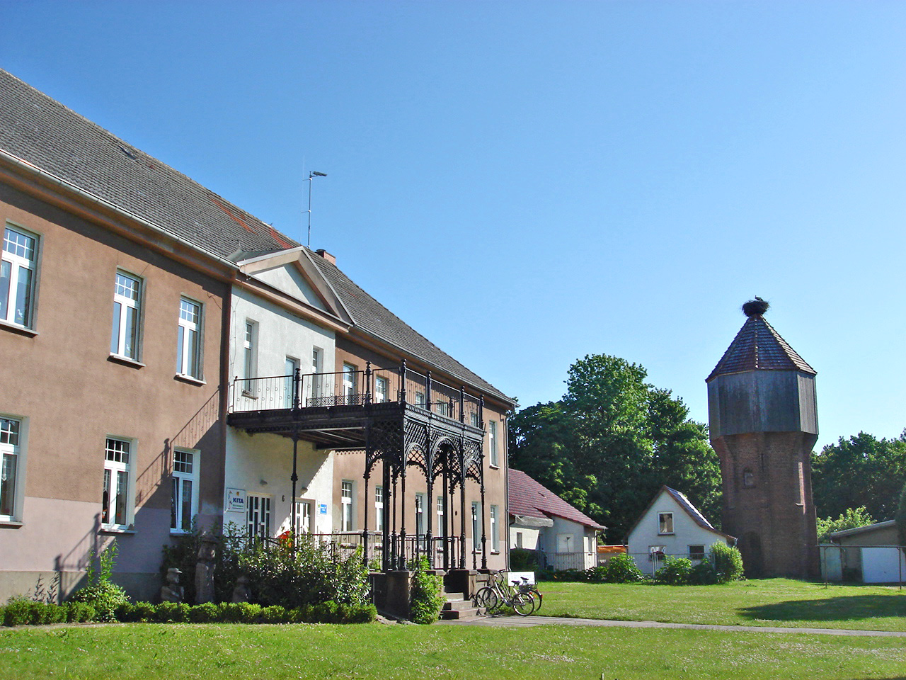 Herrenhaus von Brunn (Mecklenburg) bei Altentreptow, Landkreis Mecklenburgische Seenplatte, Mecklenburg-Vorpommern. Es wurde um 1800 im klassizistischen Stil errichtet. Von seiner Ursprungsgestalt kündet nicht mehr viel, außer dem gusseisernen Altan des Portals. Sonstige Fassadendetails wie Gesimsbänder und die alten Fenster wurden zu DDR-Zeiten entfernt. Heute beherbergt das Gutshaus altersgerechte Wohnungen, einen Kindergarten und einen Hort. (s. gutshaeuser.de)